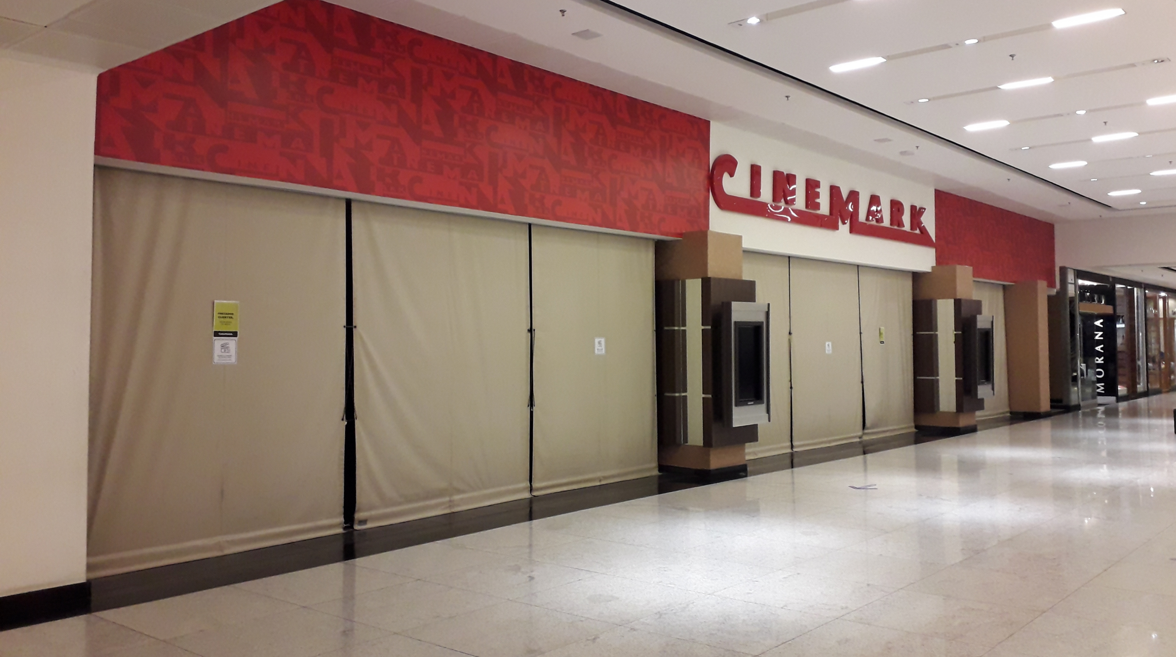 Cinemark Colinas Shopping durante a pandemia de COVID-19. São José dos Campos, São Paulo, Brasil.